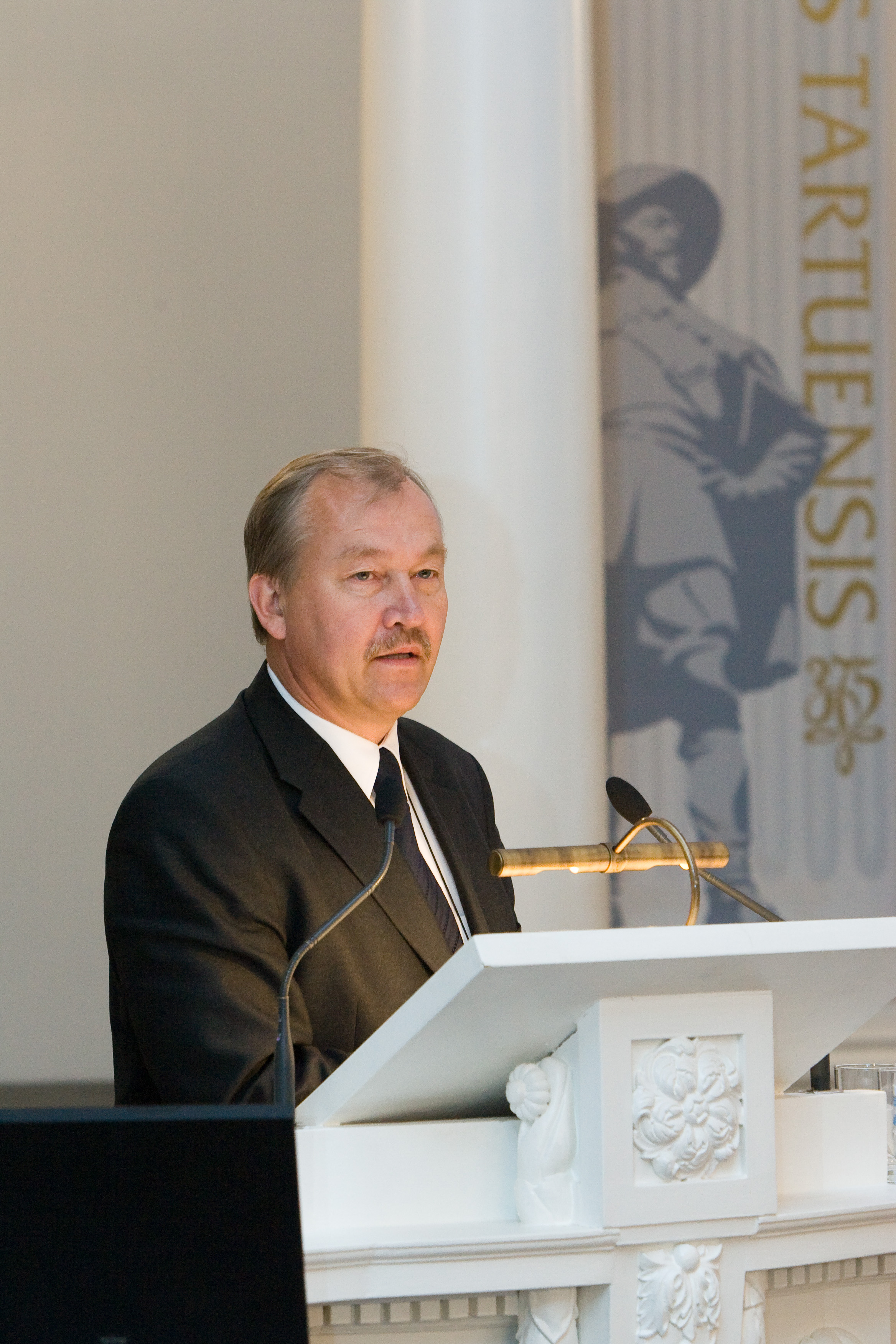 16.–20. septembril 2007 toimus Tartu Ülikoolis teine rahvusvaheline konverents „Märgalade reoainete dünaamika ja kontroll“ (Wetland Pollutant Dynamics and Control WETPOL 2007). Konverentsi 2. päev. Esineb TÜ geograafia instituudi juhataja prof Ülo Mander.